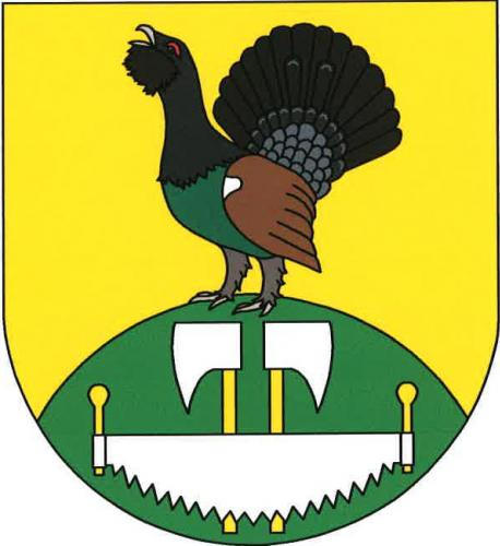 Znak, Obecnice, okres Příbram